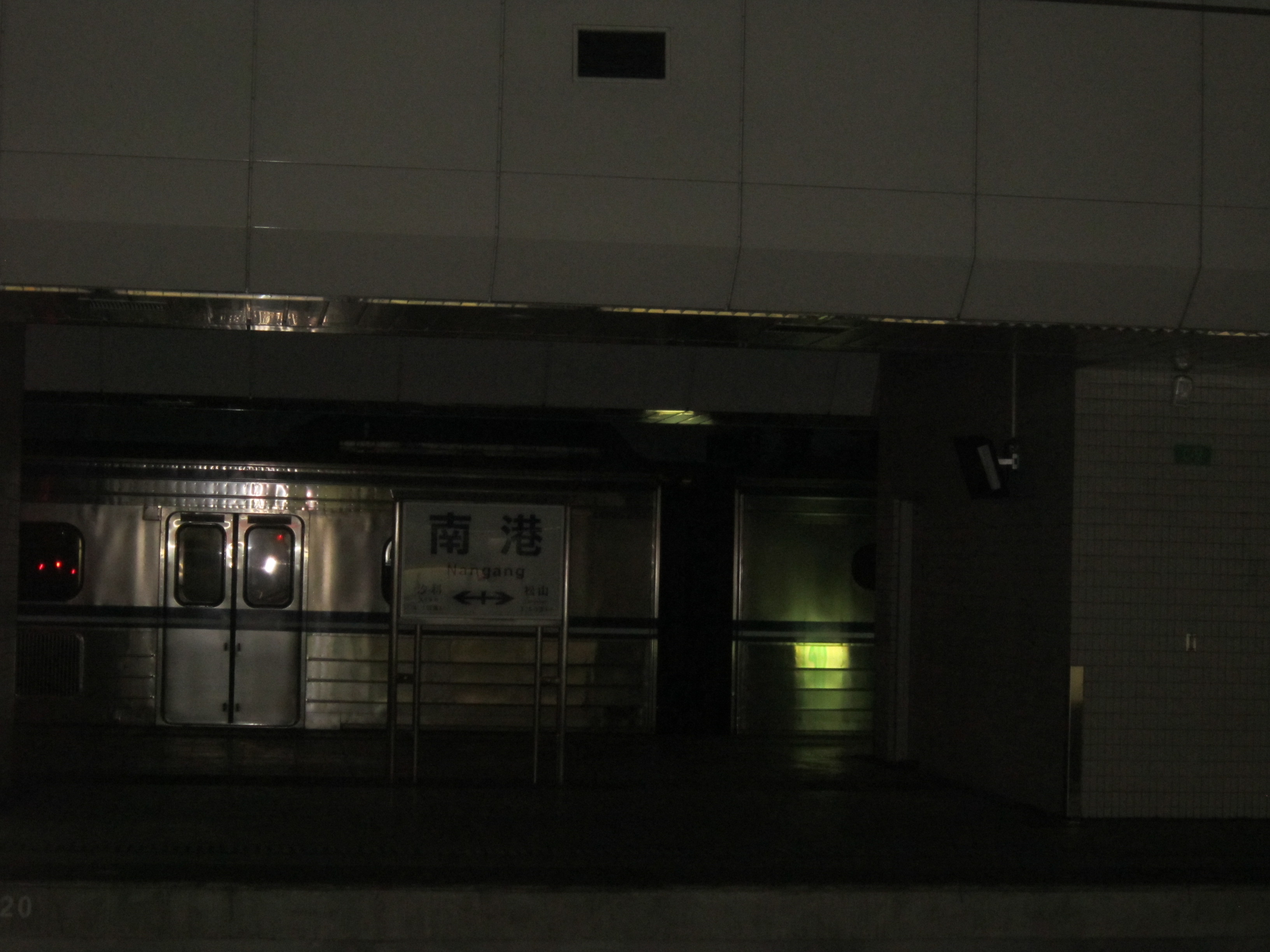 臺灣鐵路管理局第1258次區間車爆炸事故列車（臺灣鐵路管理局EMU500型電聯車），暫停在南港車站第三月台側。